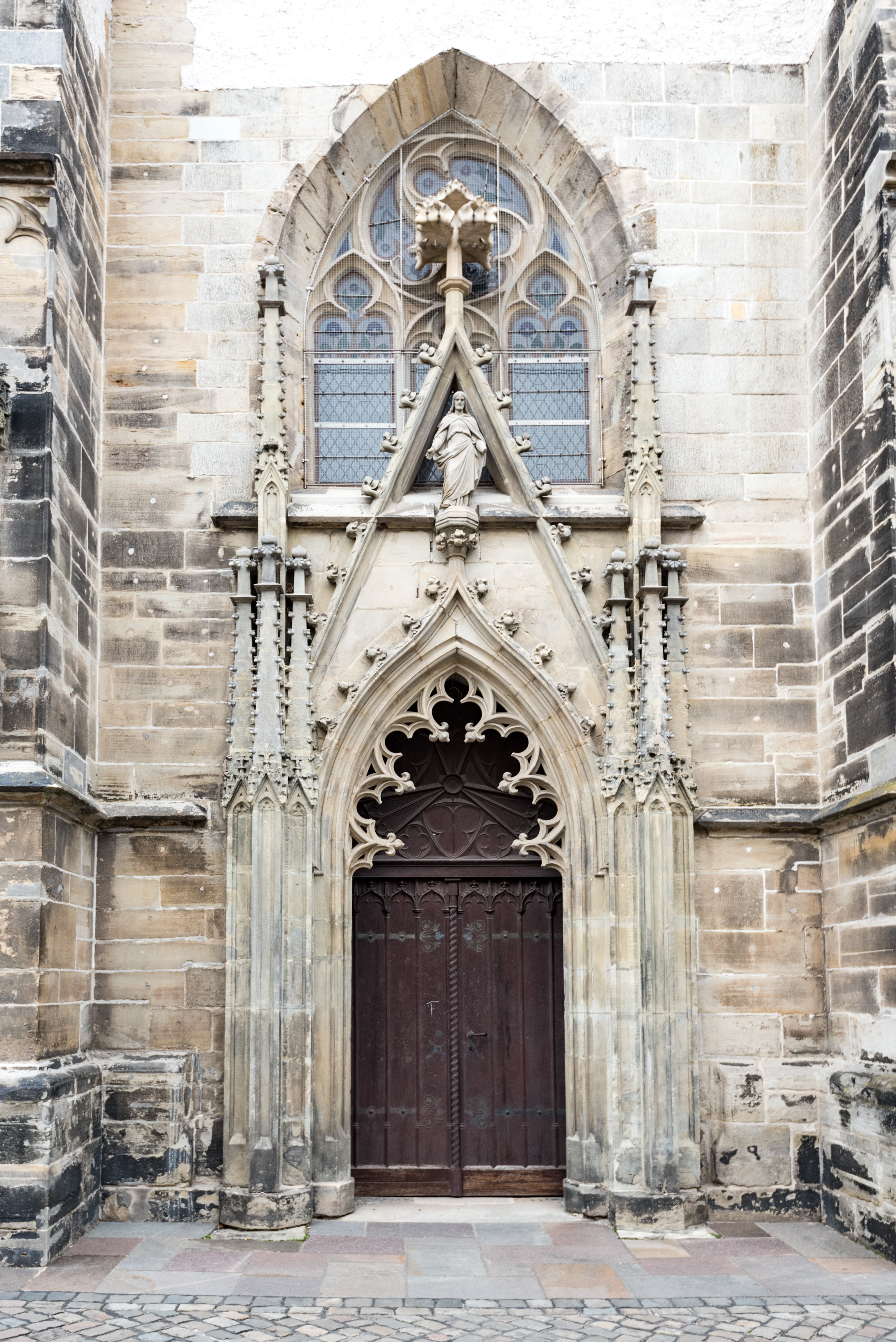 Bernburg (Saale), St. Marien